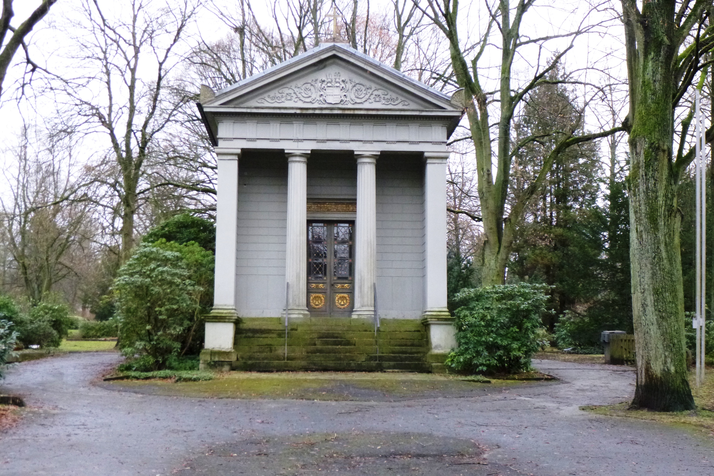 Theodoruskapelle auf dem Möhnefriedhof in Arnsberg-Neheim